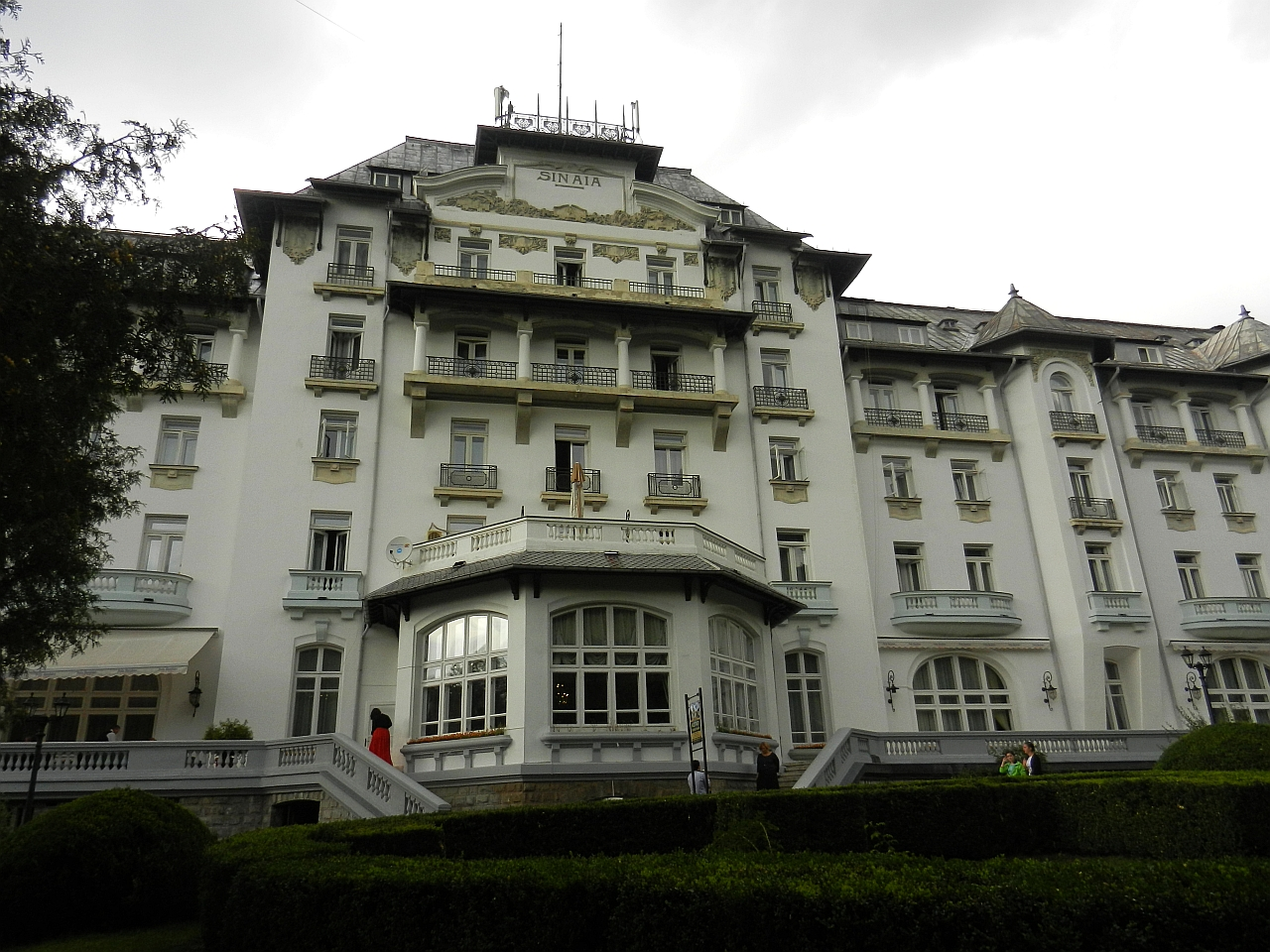 Hotel "Palace"